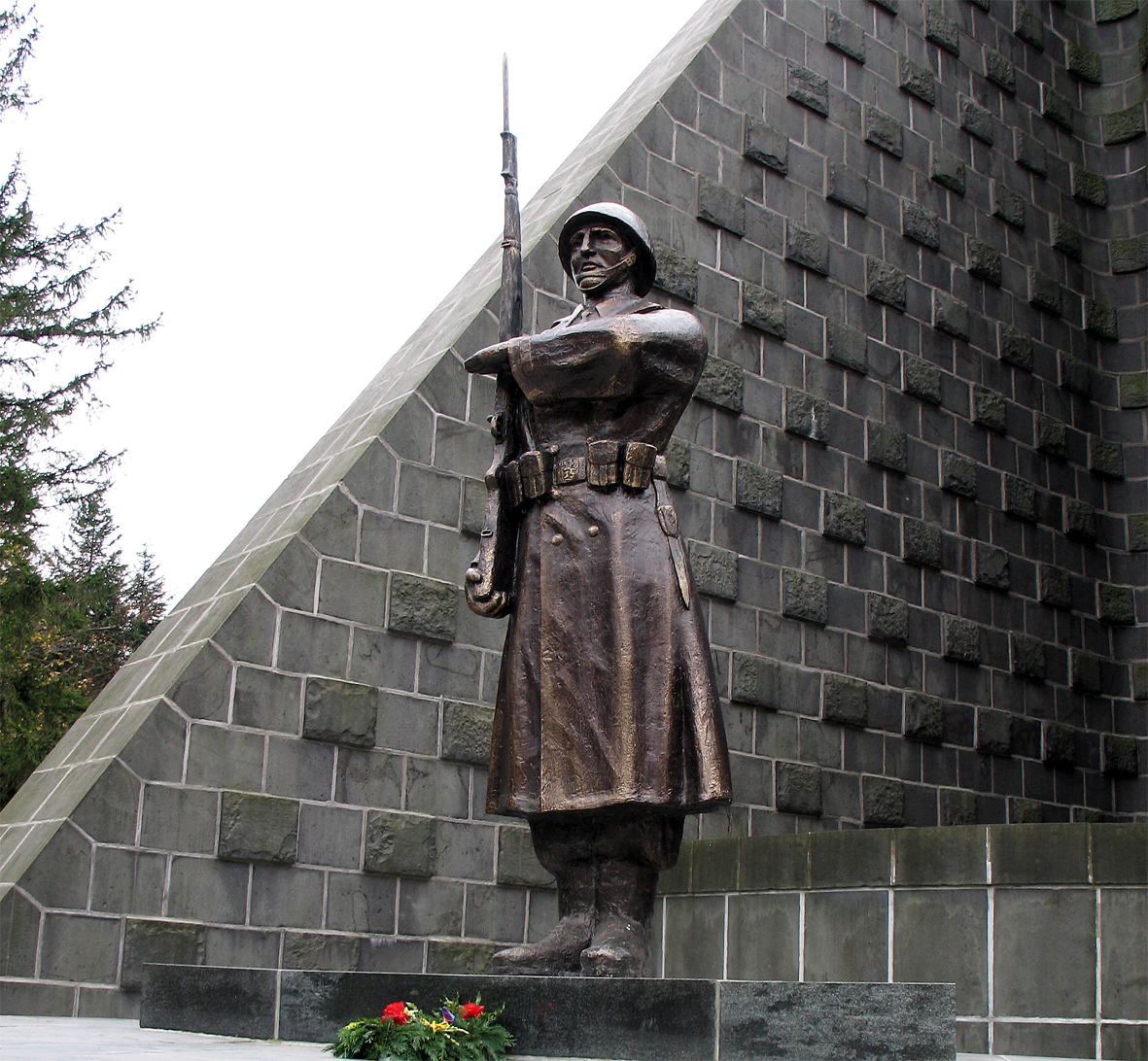 Epoxidová plastika na pamätníku ČSA na Dukle. Kopia strateného diela Jan Adolfa Víteka z 50. rokov.